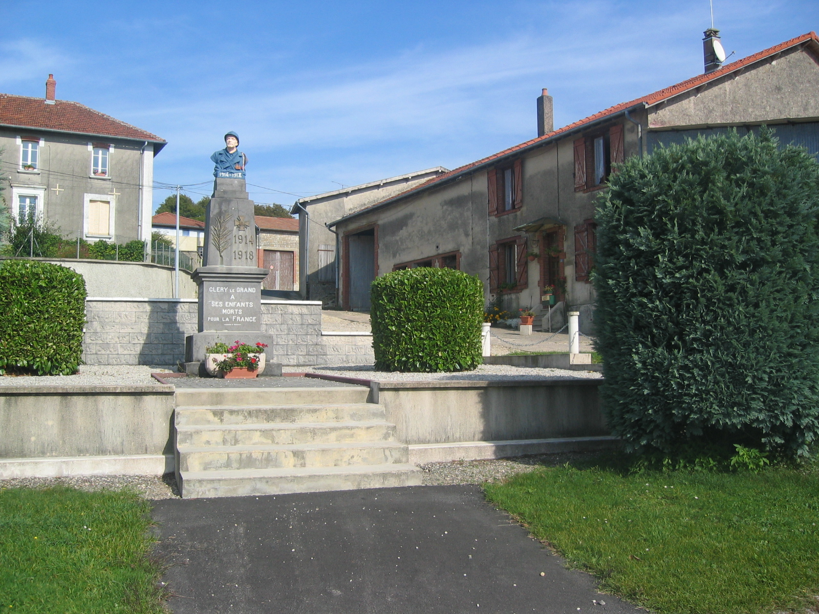 Monument aux Morts de Cléry-le-Grand